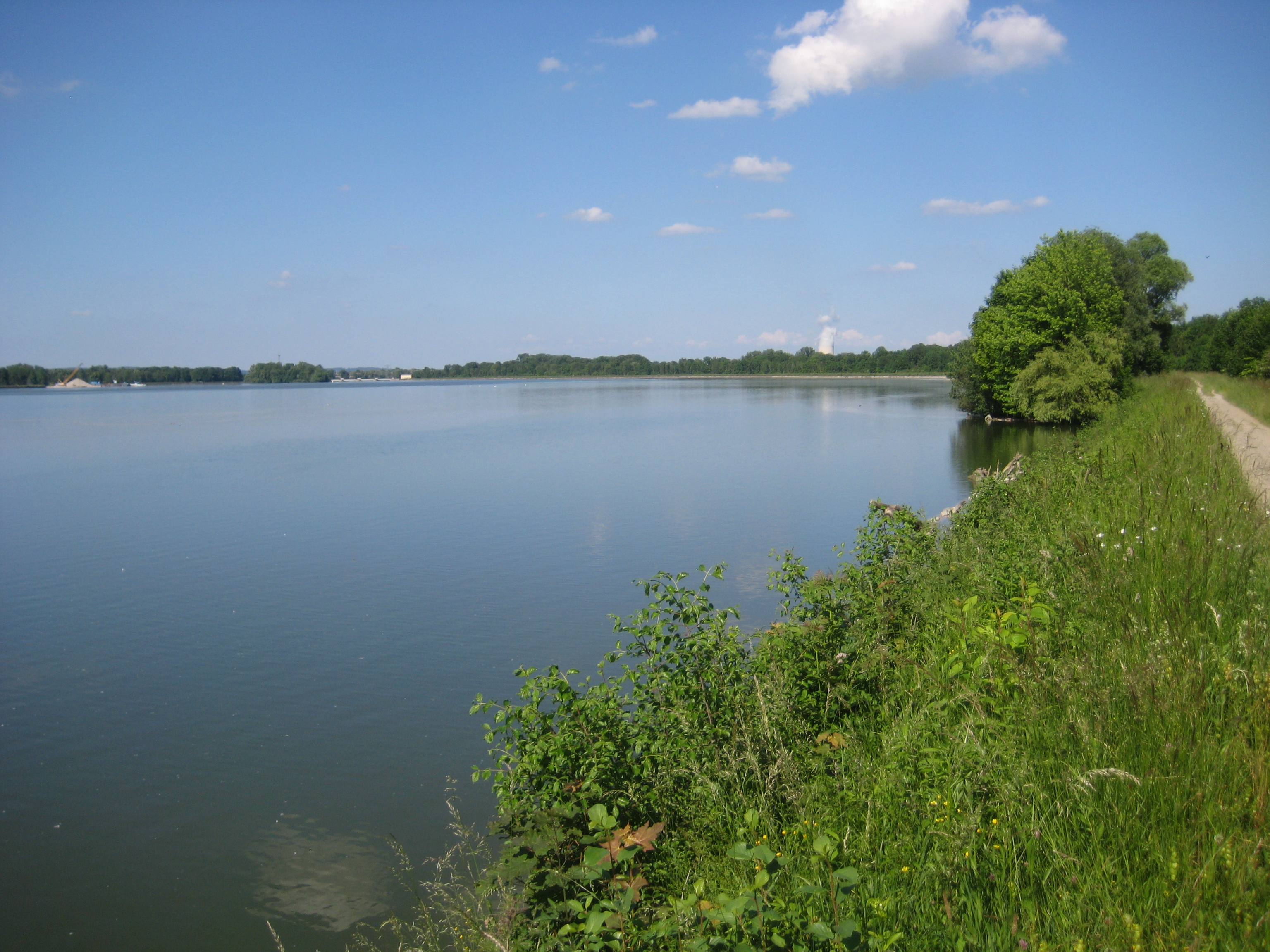 (LSG:BY-LSG-00524.01)_LSG Altheimer Stausee